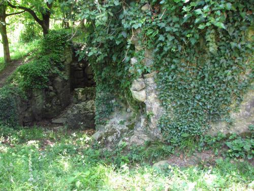 თვრინი